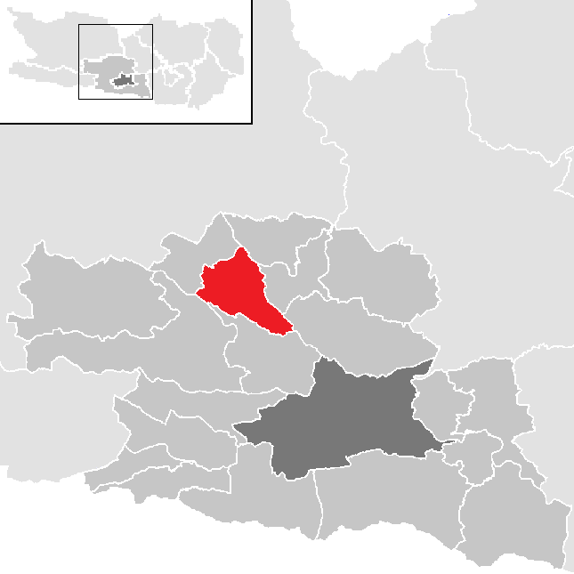 Bezirk Villach-Land